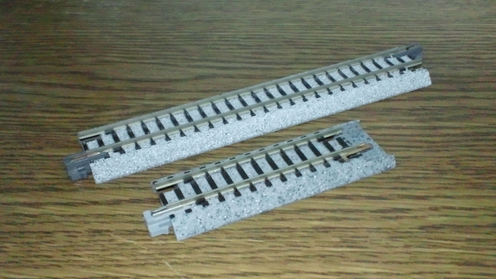 KATOの鉄道模型用道床付き線路ユニトラック。手前が現在の製品。奥は1998年以前の製品。